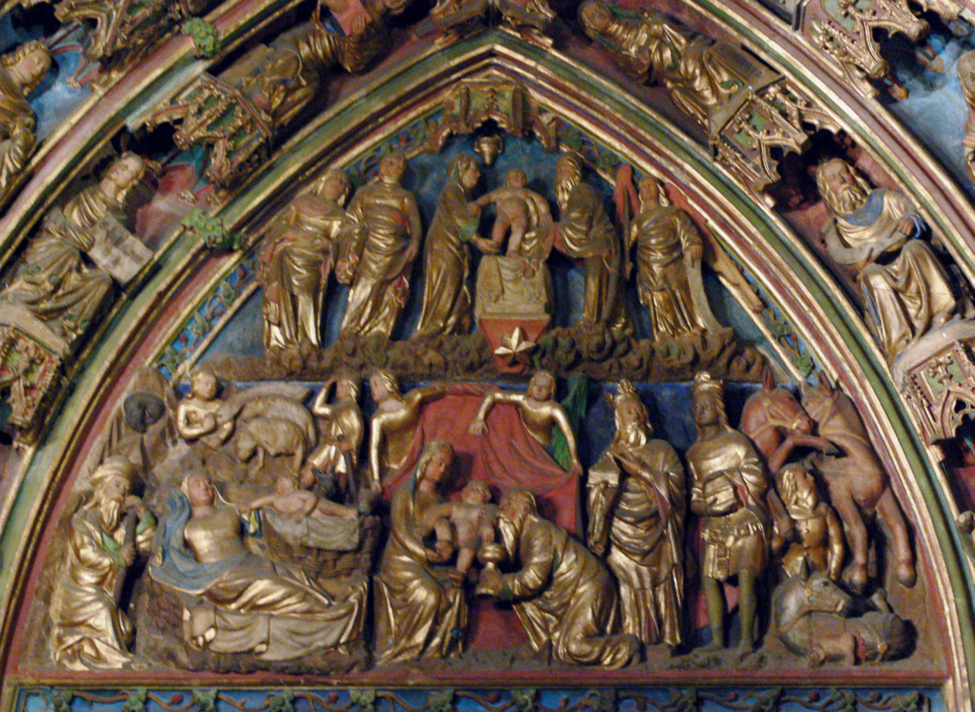 Frauenkirche, Nürnberg Vorhalle: Tympanon des Portals zur Kirche, spätgotisch, farbige Fassung 1880 frei rekonstruiert von August von Essenwein